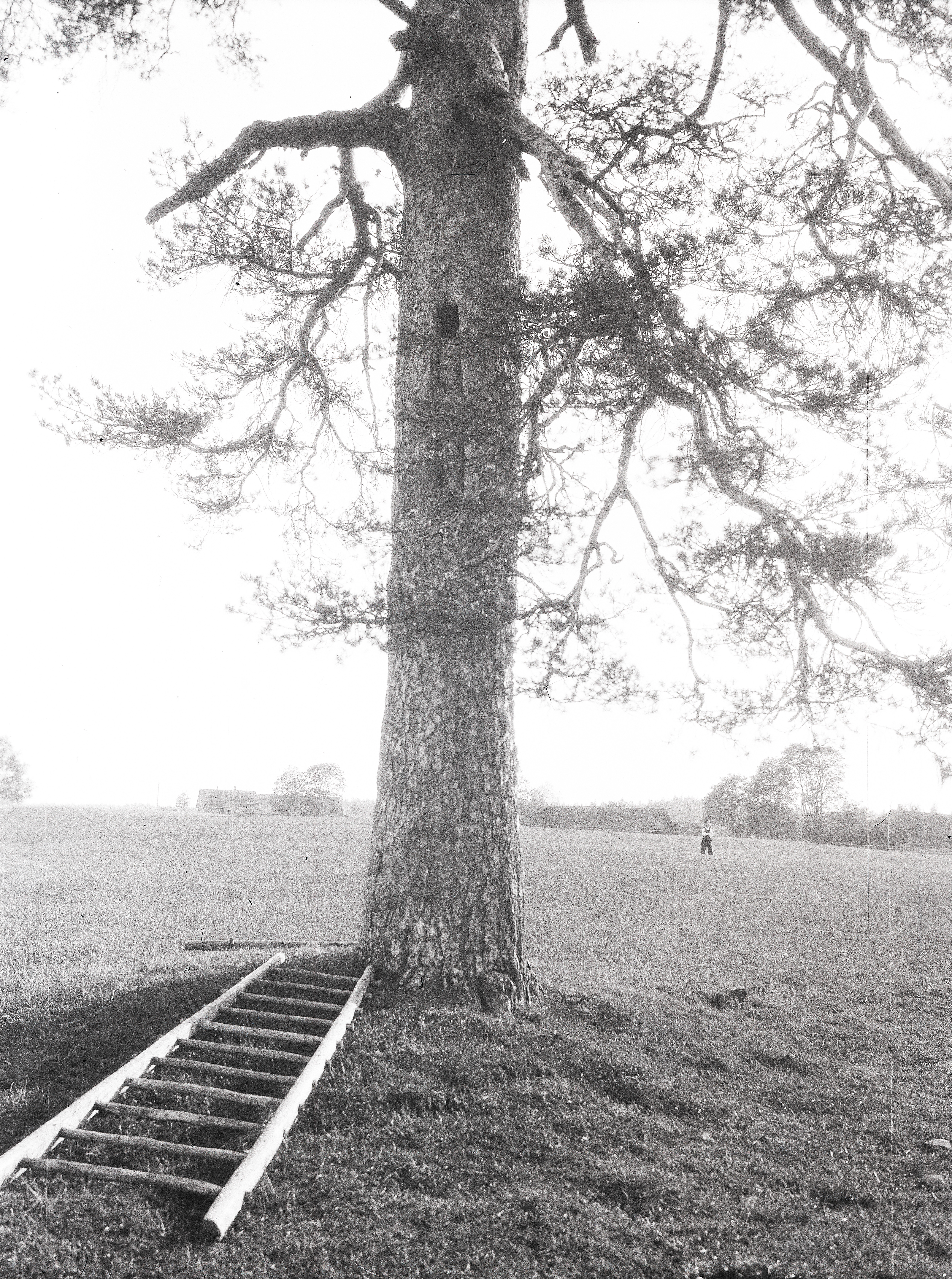 Tarupedajas, Rõuge khk